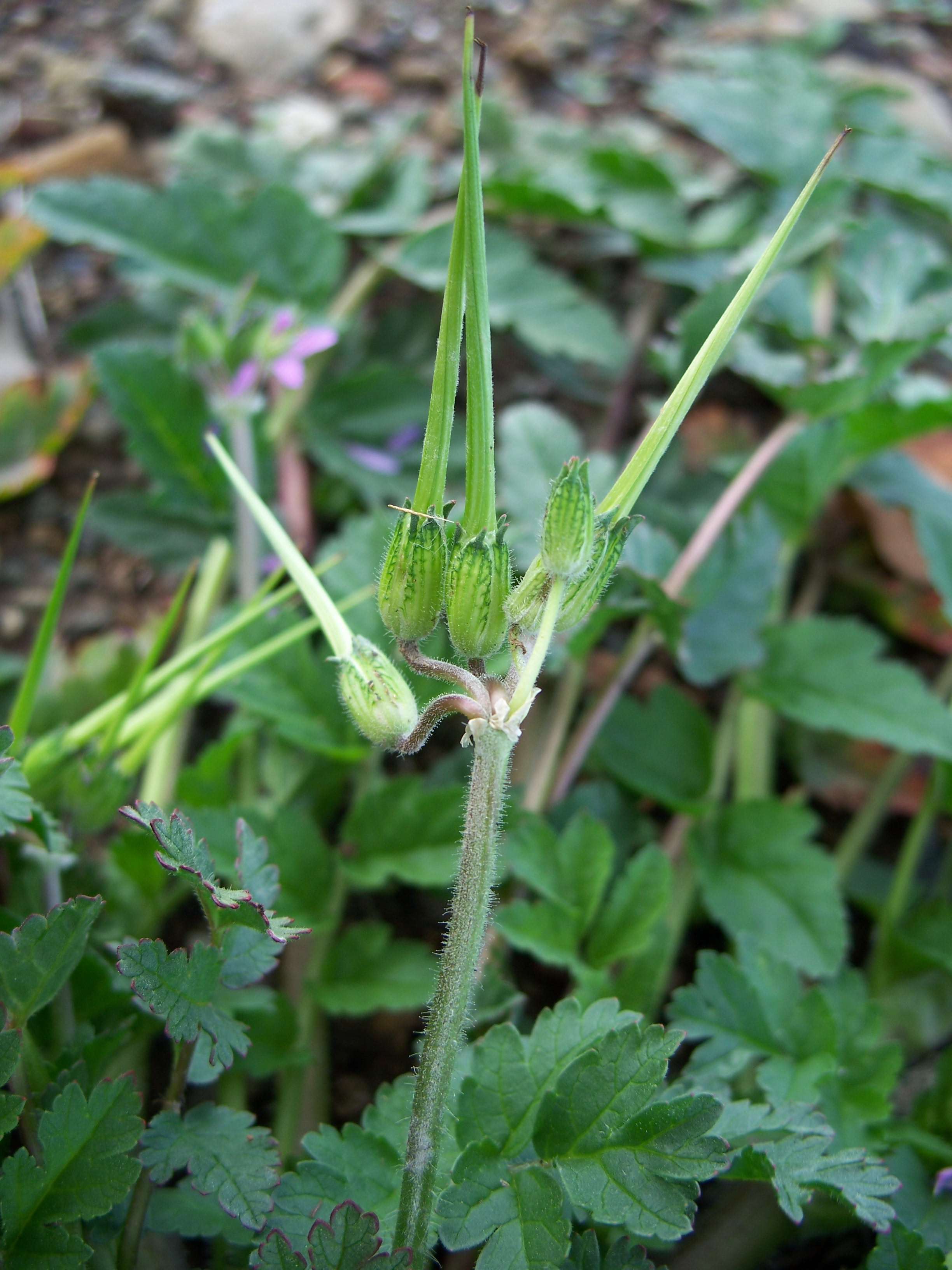 Erodium moschatum Made in San Jose, California. Identified by Franz Xaver.